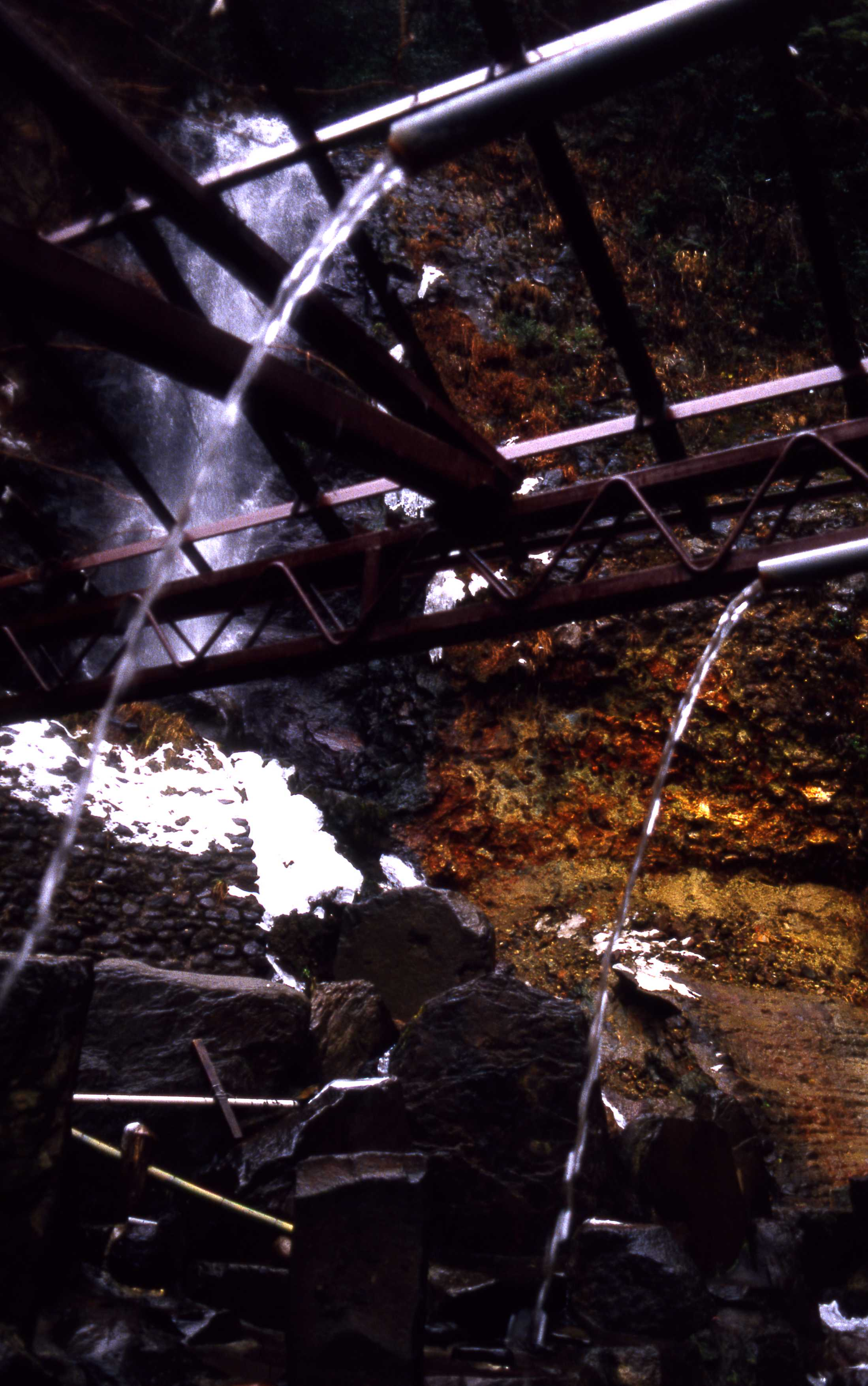 垂玉温泉全景 【おぉたむ すねィく探検隊】秘湯発掘班 丸園半輔 ～photo by Autumn Snake